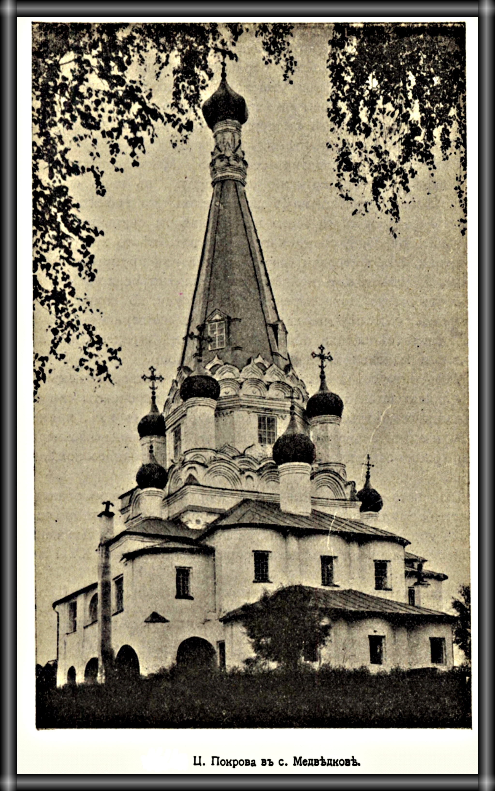 Храм Покрова в Медведково.